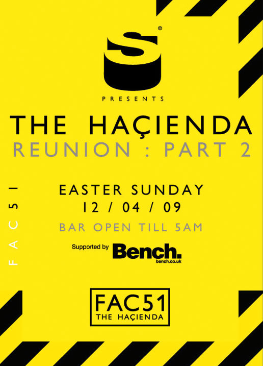 Hacienda do over the weekend